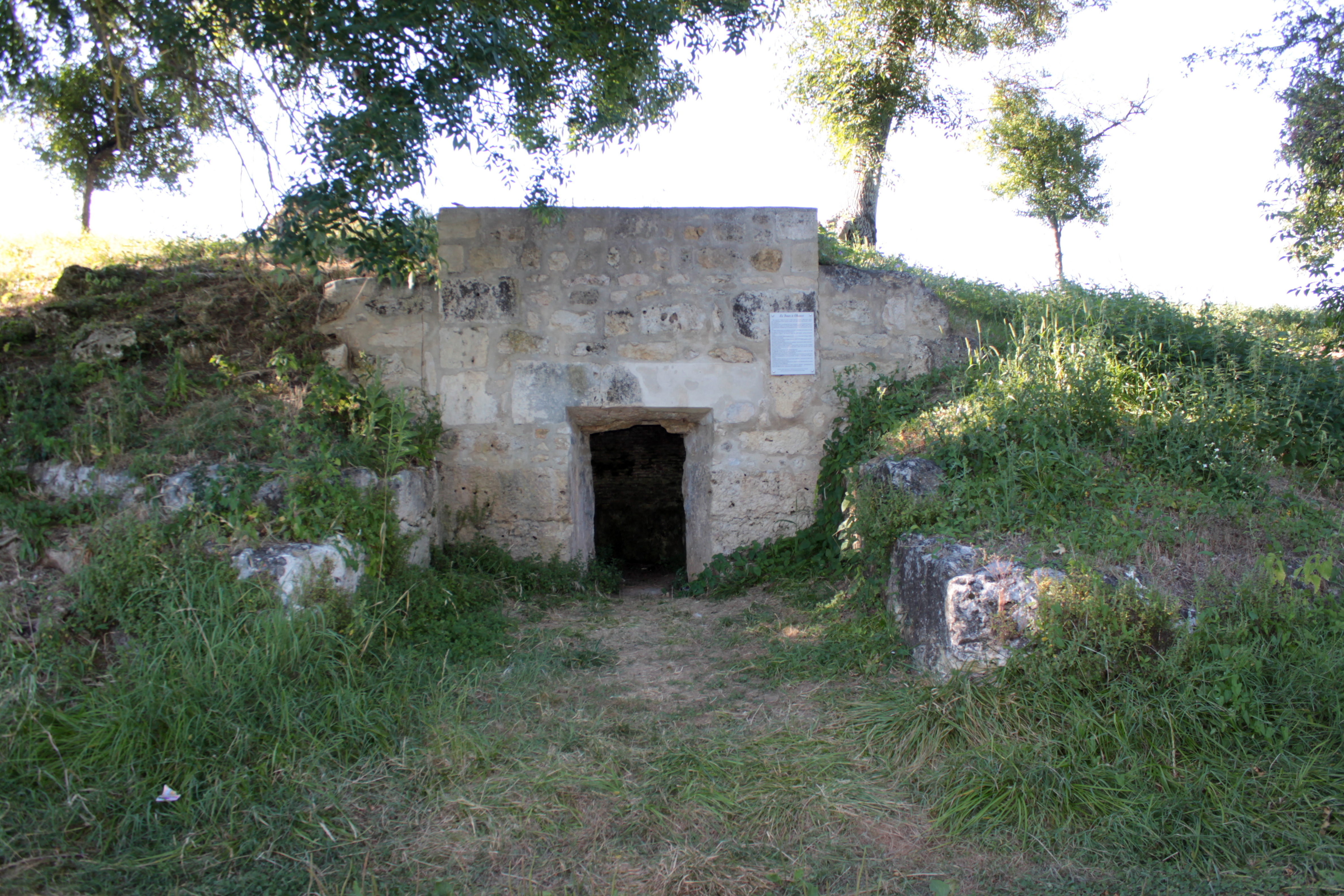 Four à chaux, Fr-17-Le Mung.